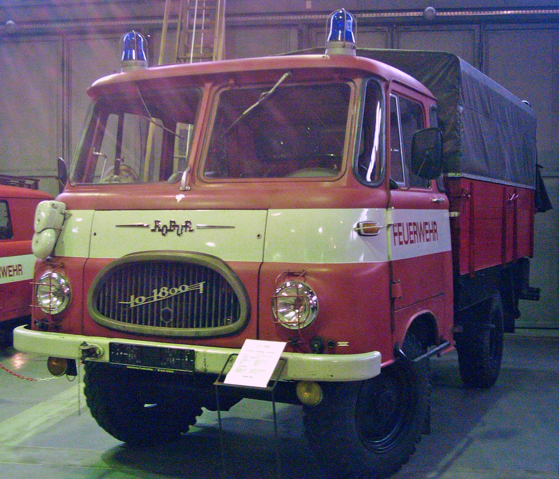 Robur 1800 T – Löschfahrzeug mit Tragkraftspritze.